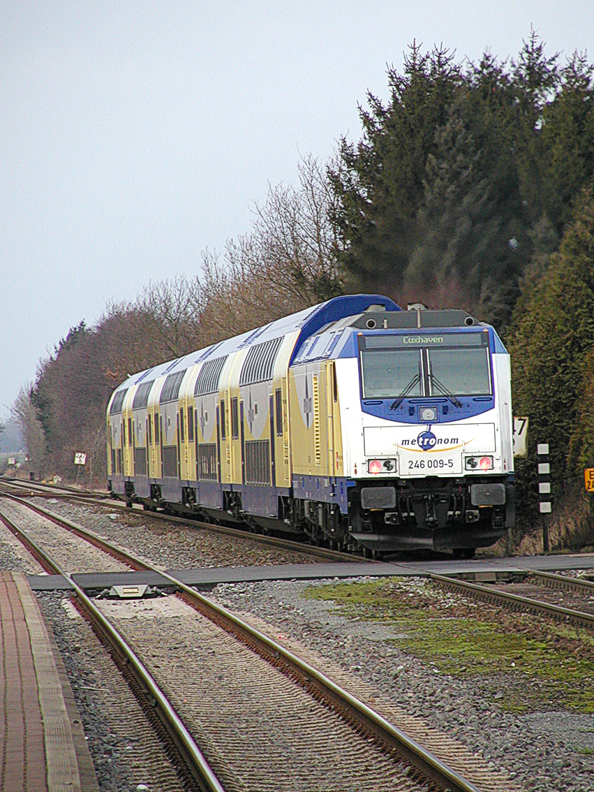 Der Metromom nach Cuxhaven fährt in Cadenberge los.